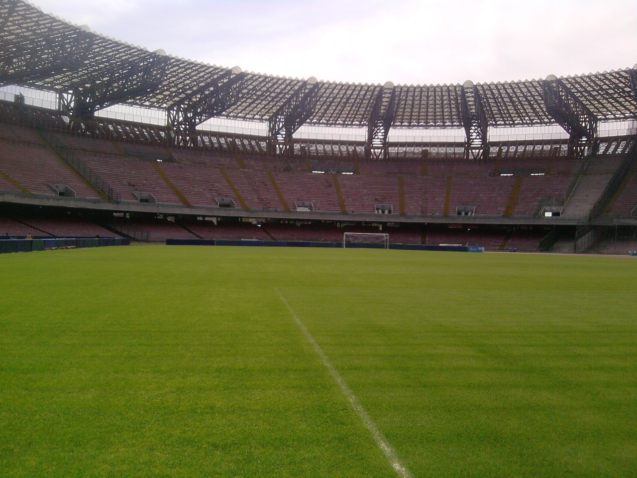 l'autore sono io